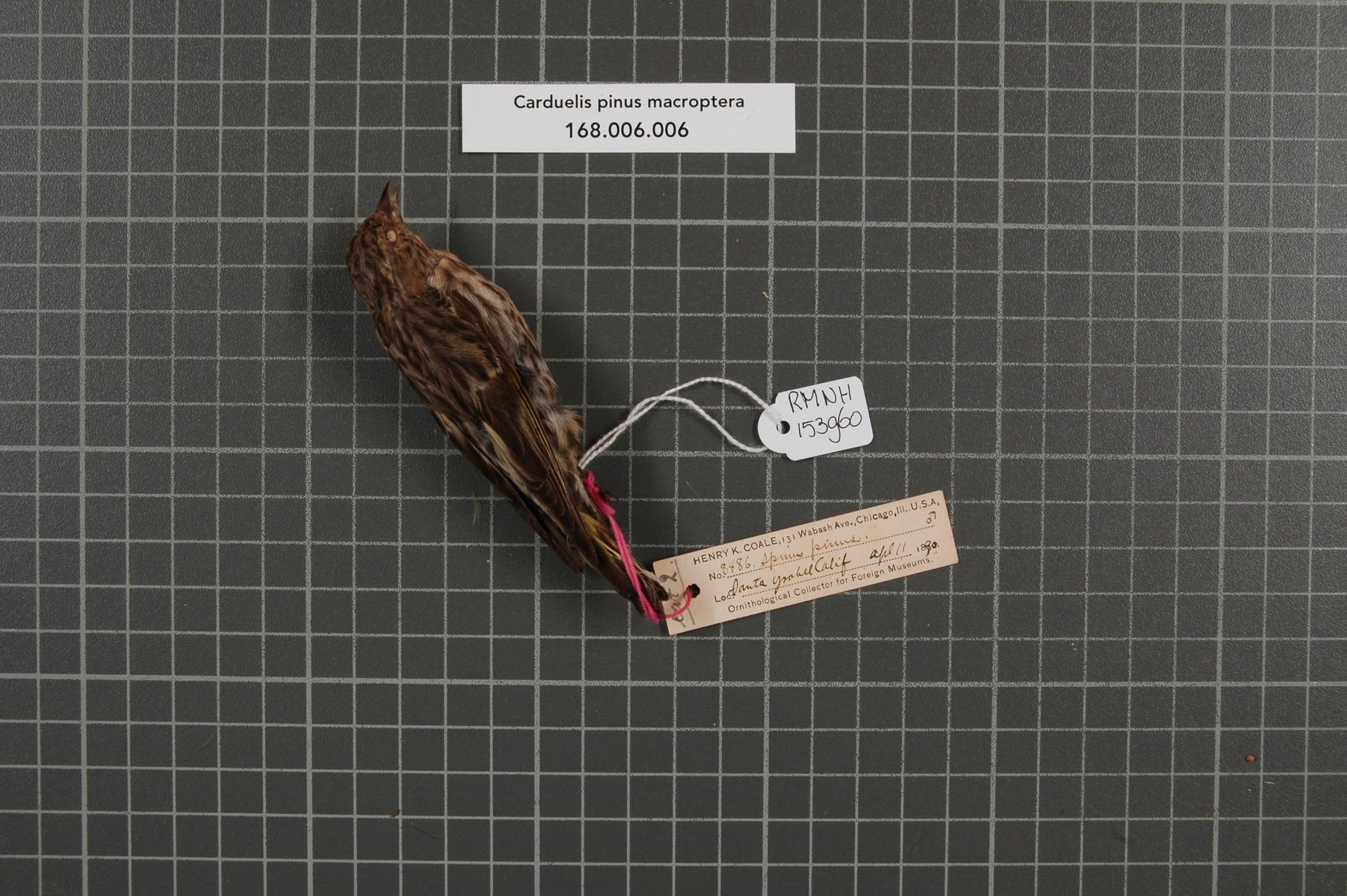 Carduelis pinus macroptera (Bonaparte, 1851)